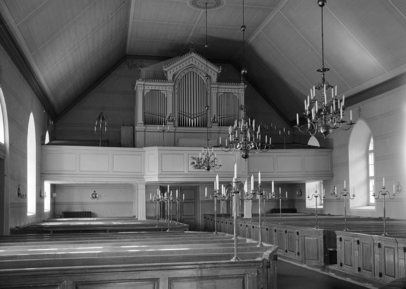 Interiör mot orgelläktaren, mot väster. Kategori: (02) InteriörerInteriör mot orgelläktaren, mot väster.